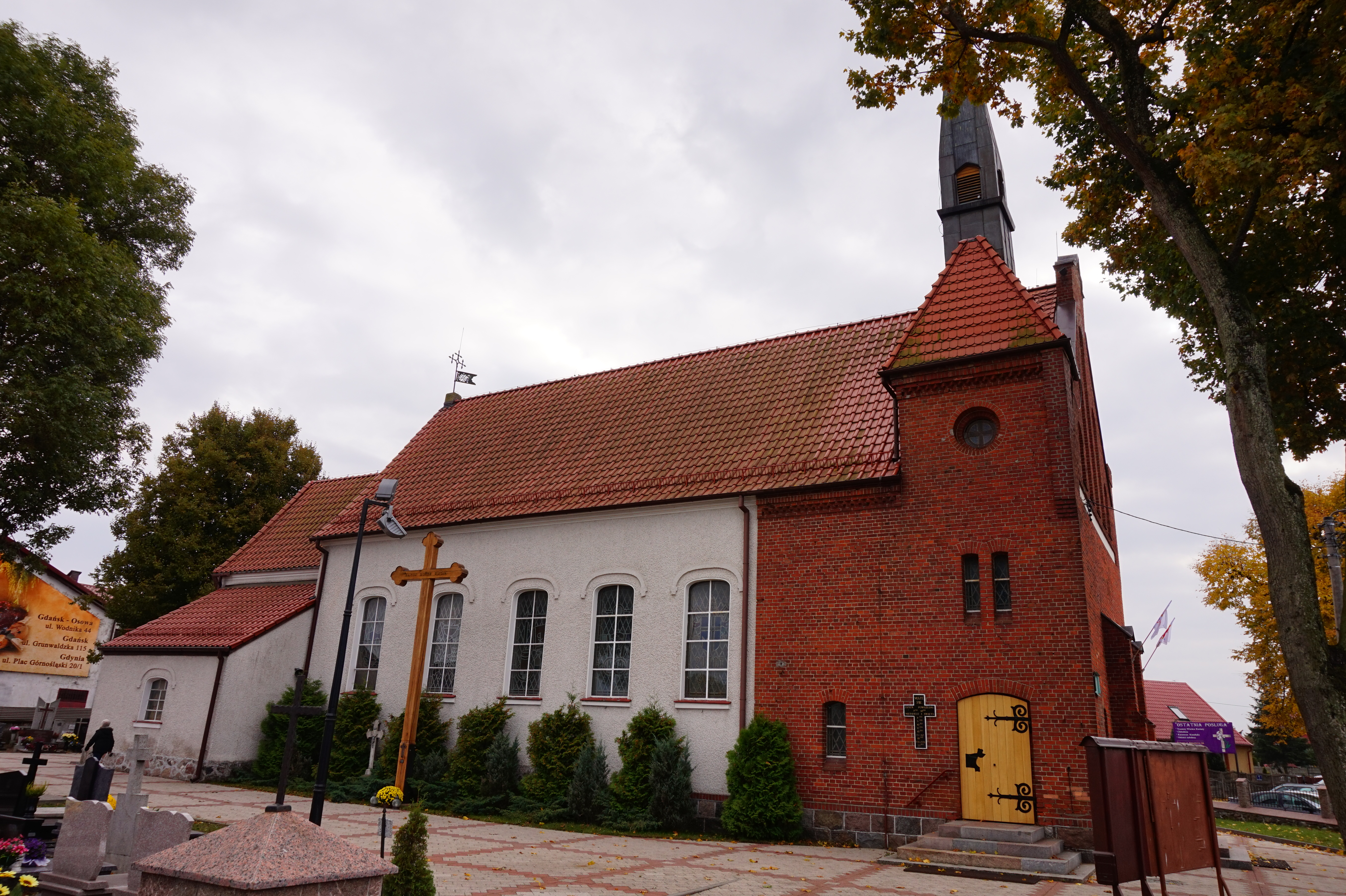 Kościół we wsi Chwaszczyno